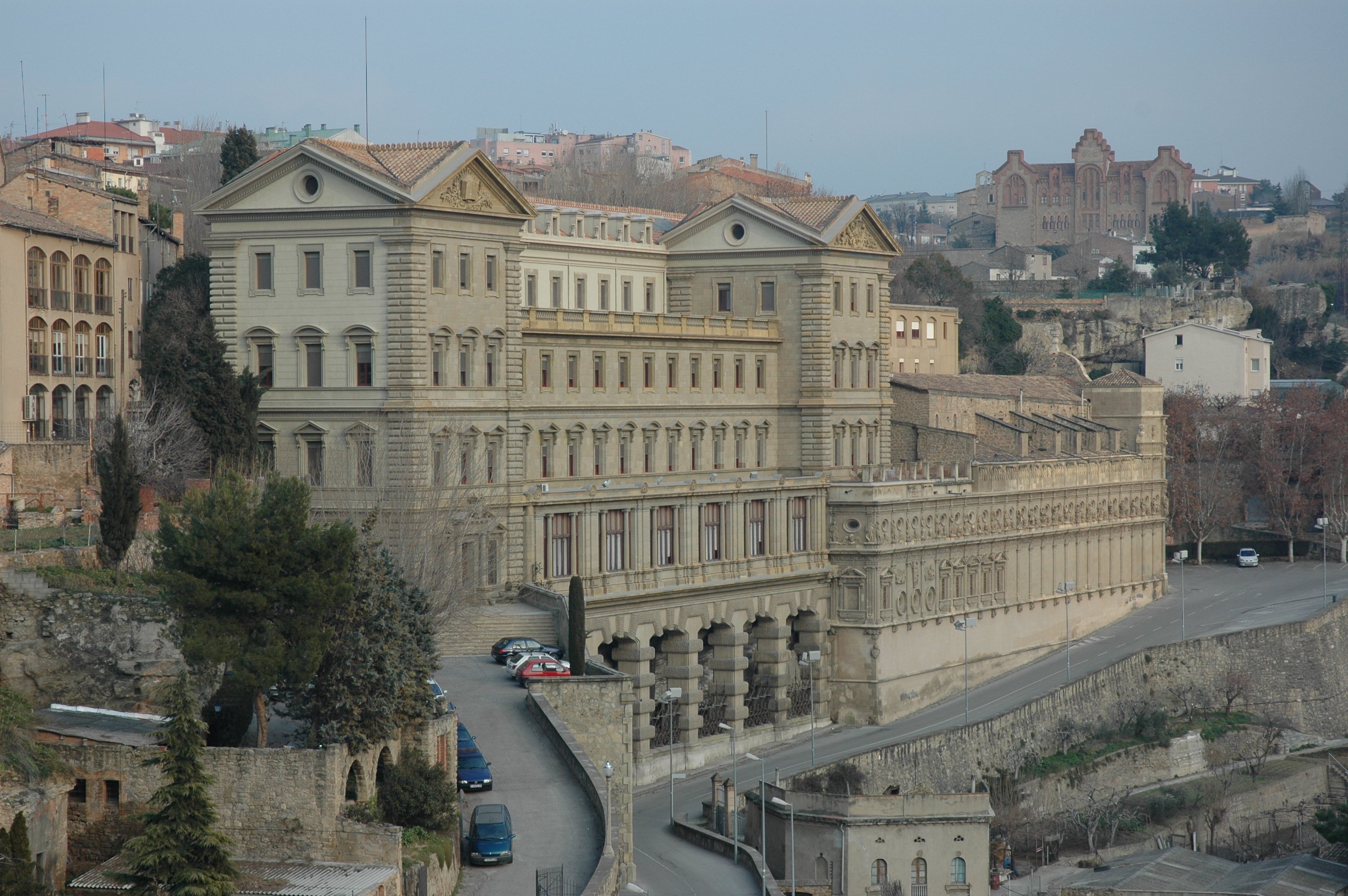 La Cova des de la Seu